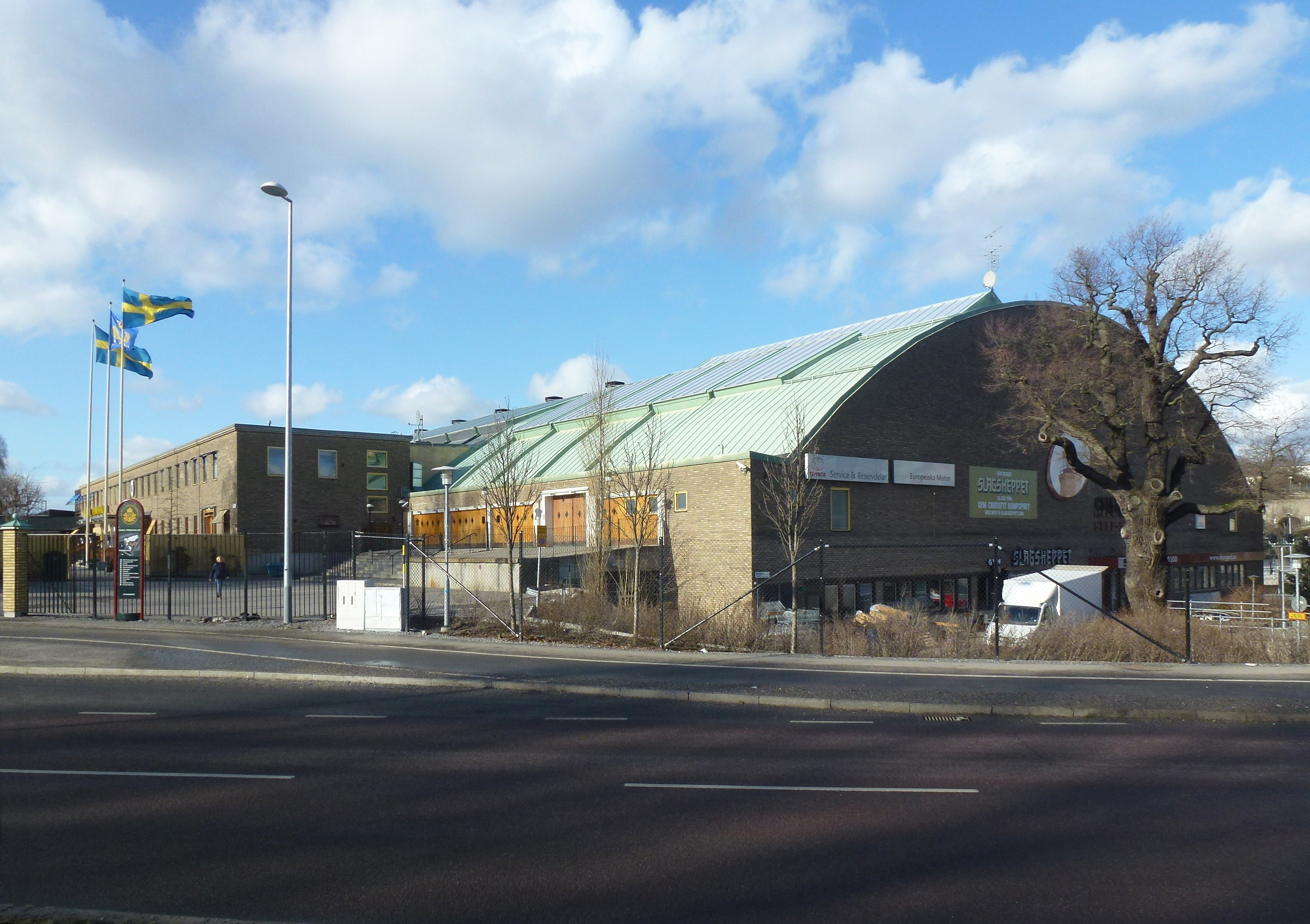 Kungliga Tennishallen från Lidingövägen